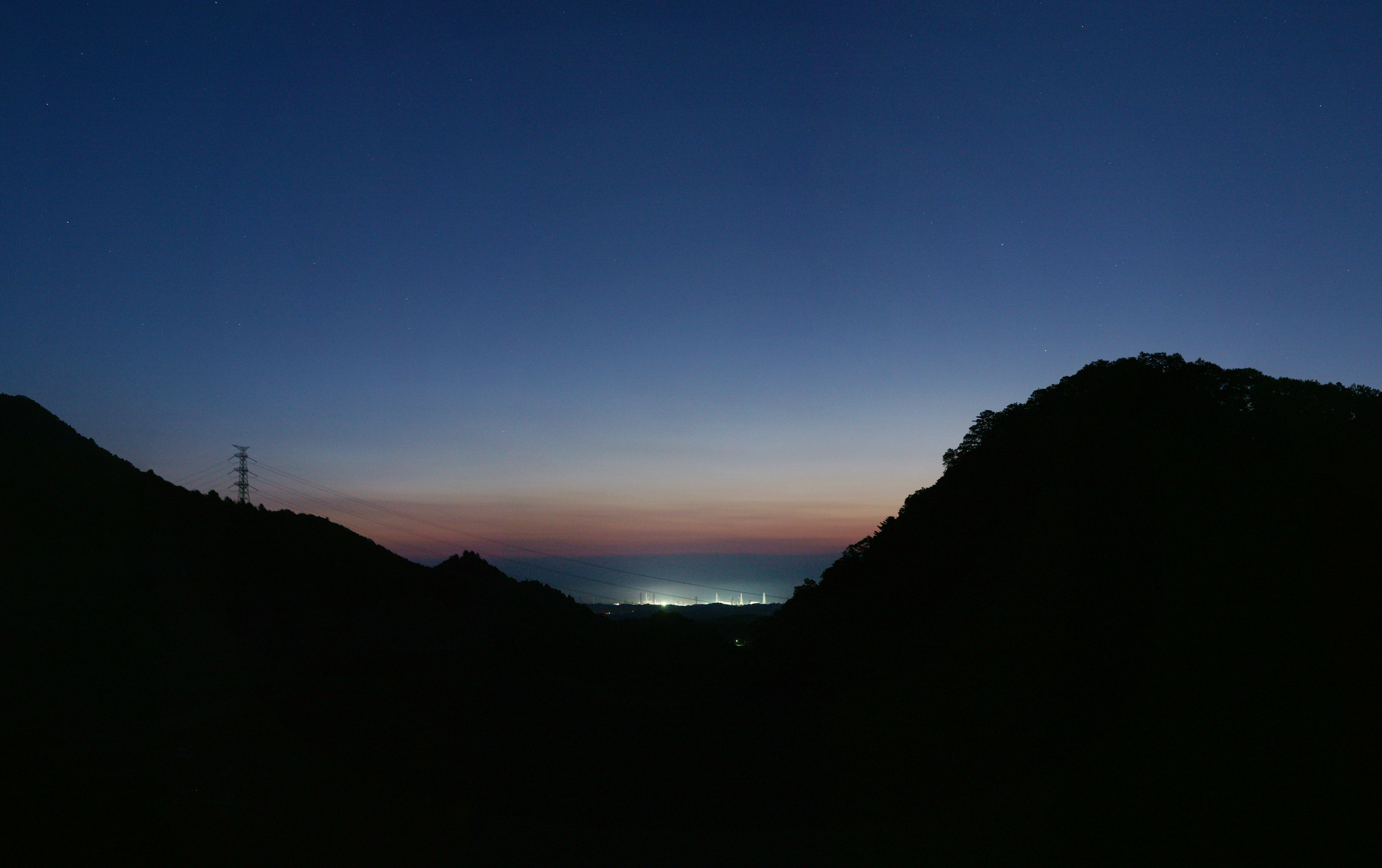 福島県双葉郡大熊町方向をみる。中央の光は第一原発。